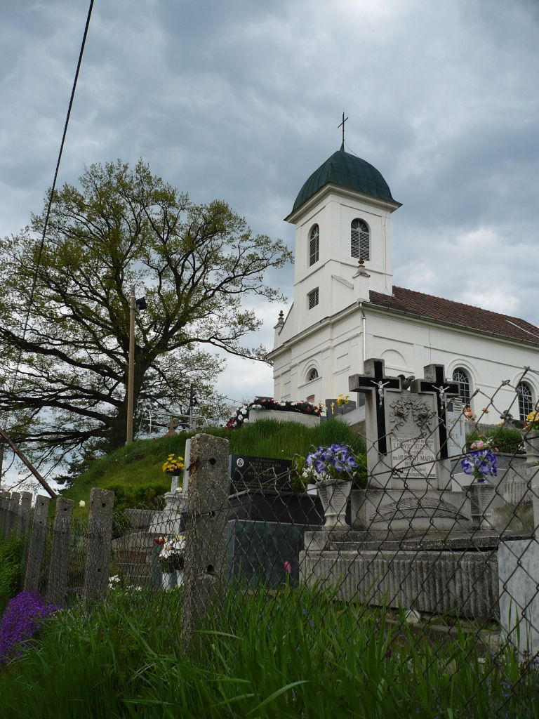 Istenmezejei római katolikus templom